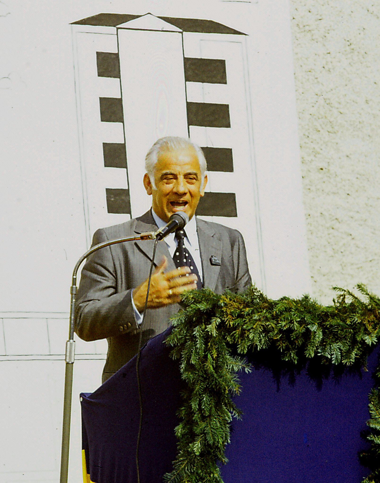 Landesrat Bierbaum bei der Festrede, 100 Jahrfeier 1975